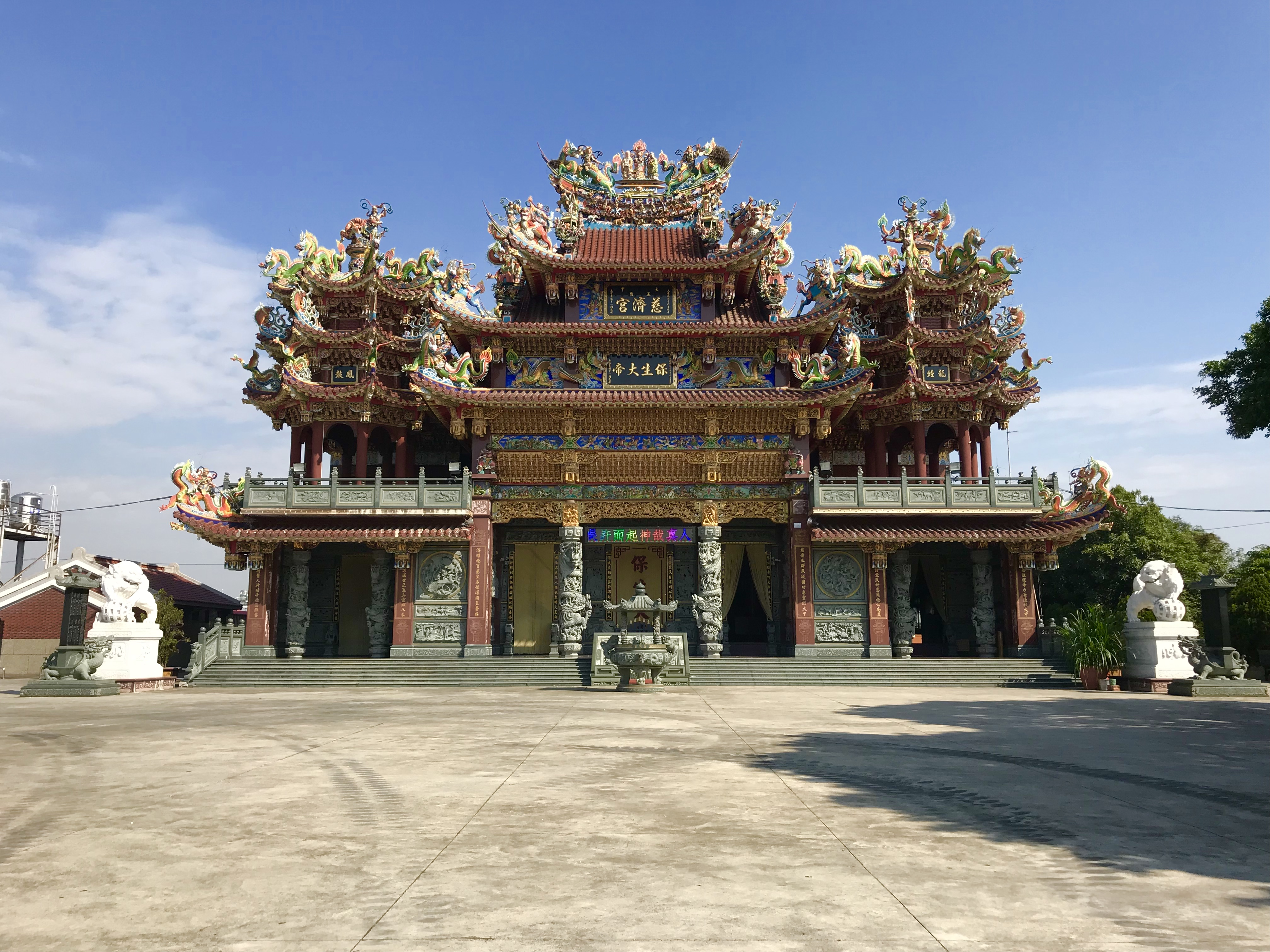 中文（台灣）: 大甲慈濟宮正面照